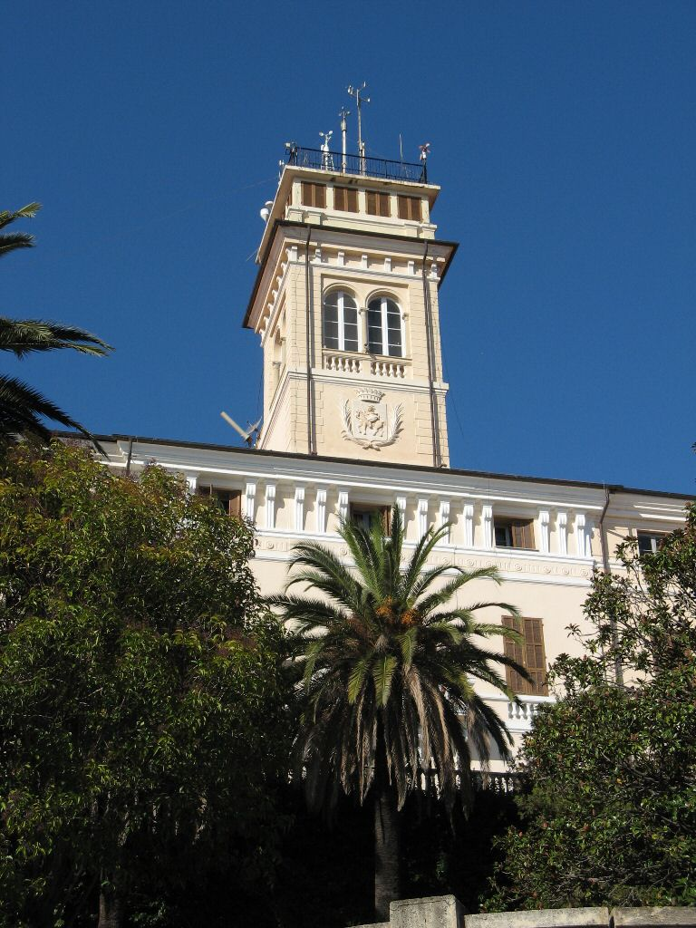 Osservatorio Meteorologico, Imperia, Italy